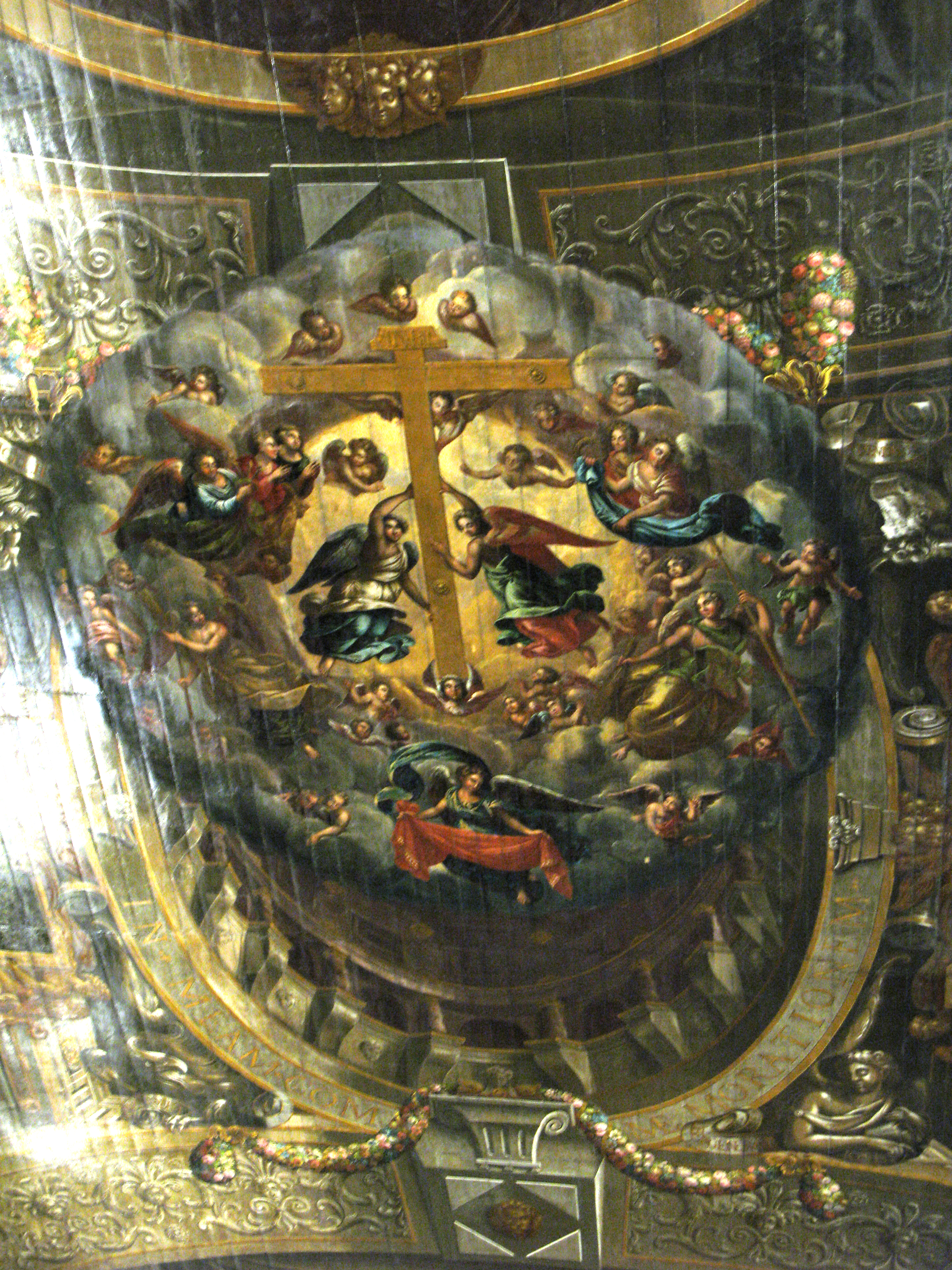 Triunfo da Santa Cruz